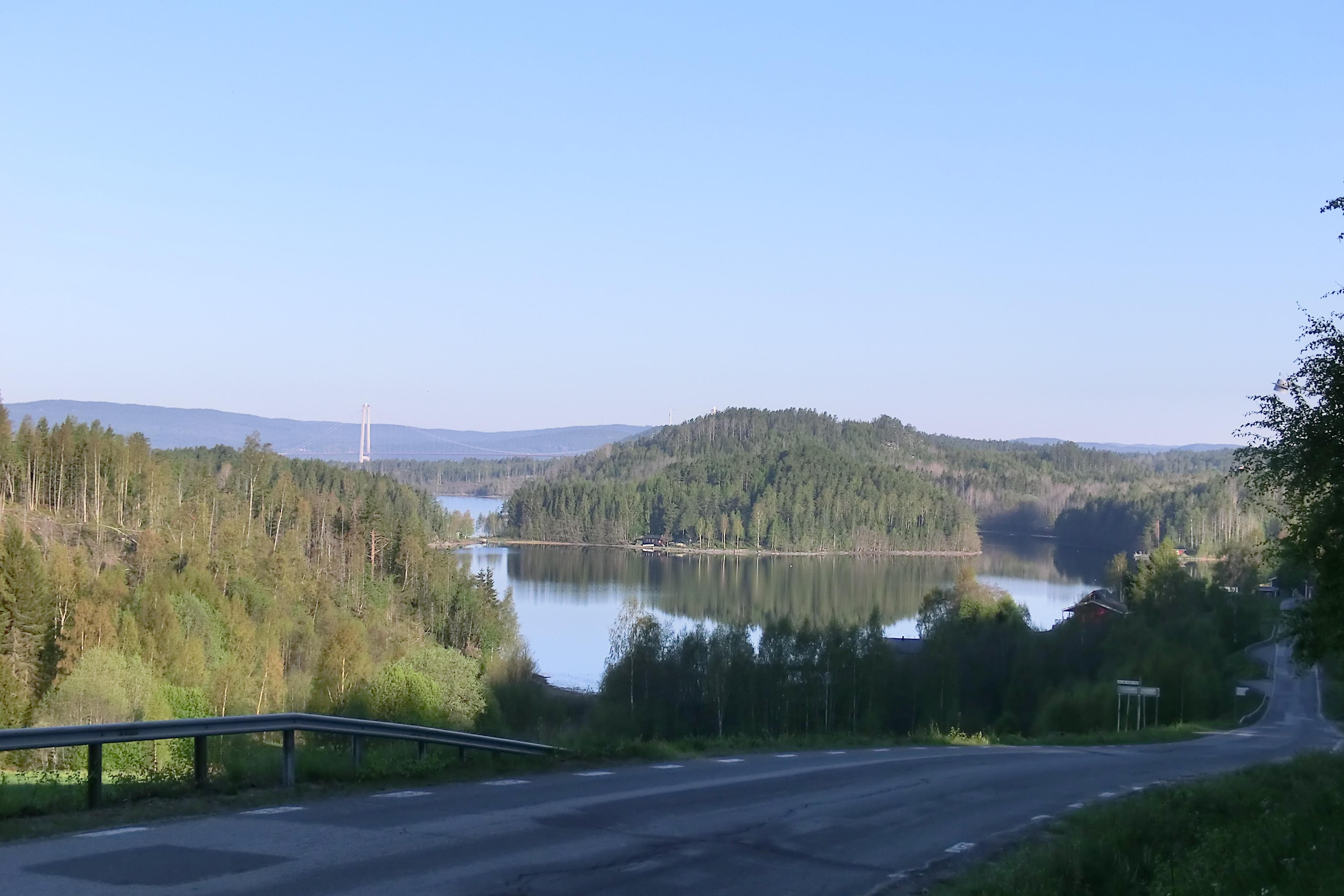 Storfjärden, från Lövvik